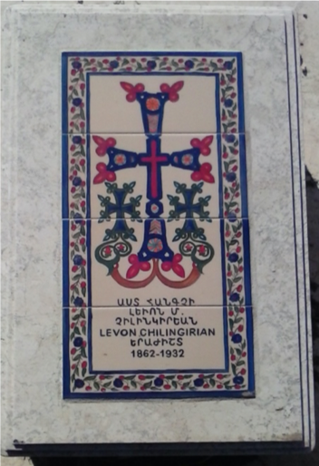 Լևոն Չիլինկիրյանի շիրմաքարը Երուսաղեմի Ս. Փրկիչ գերեզմանատանը